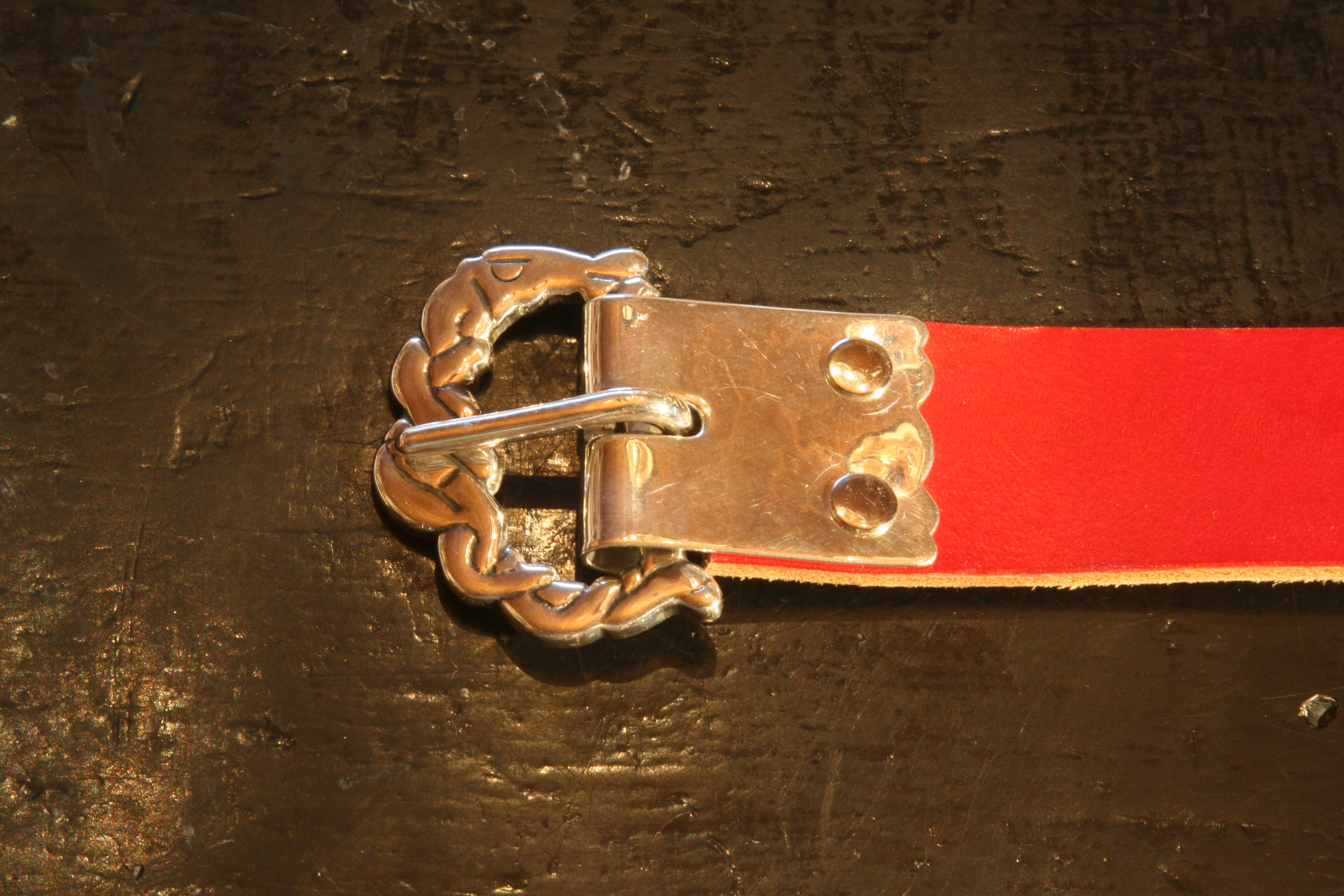 Sølvspænde med eksempel på "oxydering" med svovlever.